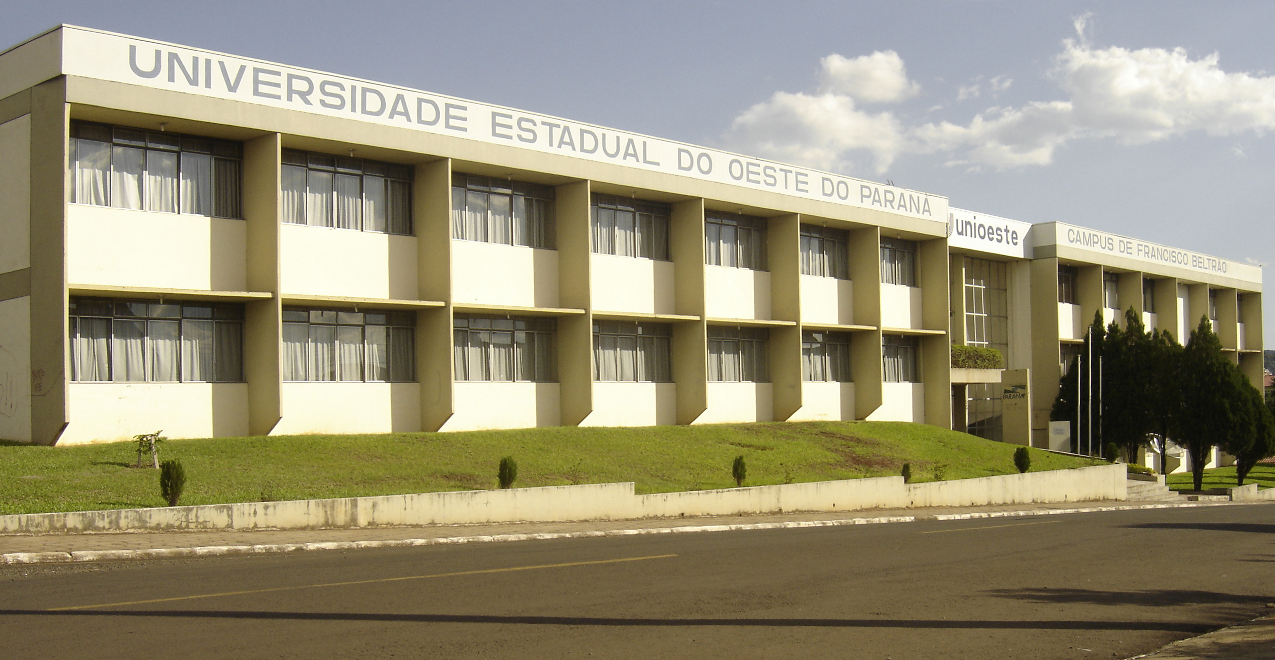 Prédio da universidade estadul do oeste do paraná - campus francisco Beltrao.